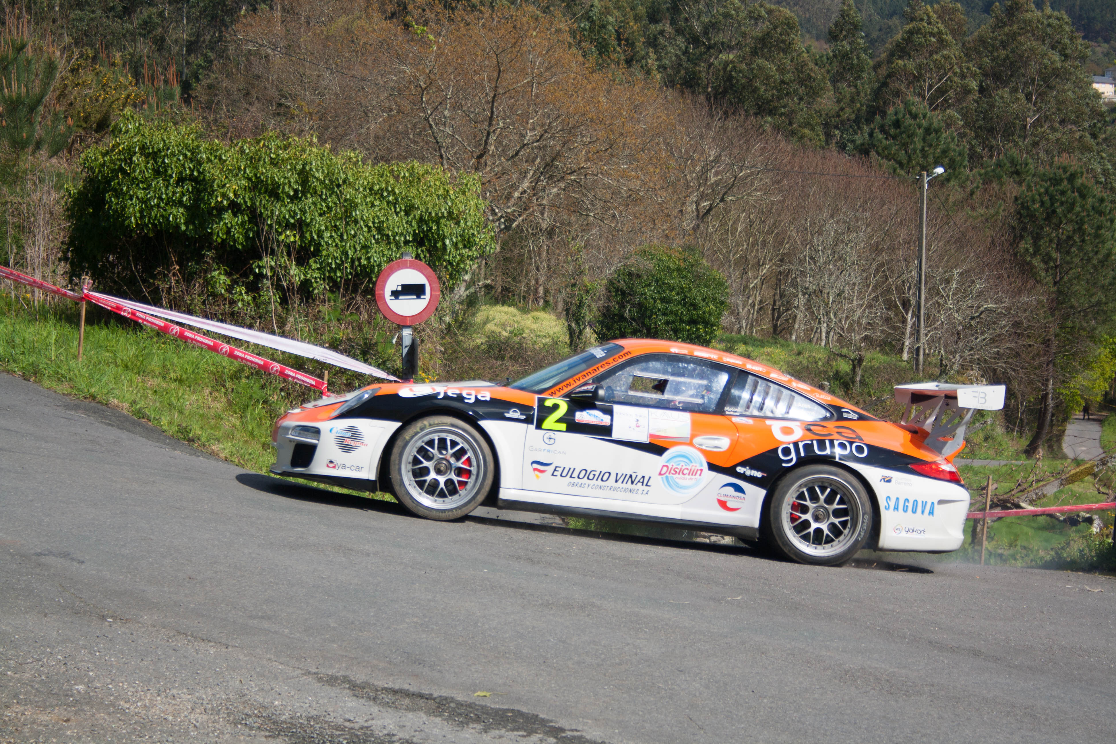 Primera pasada de la tarde por el tramo que transcurre por la aldea de Quintáns